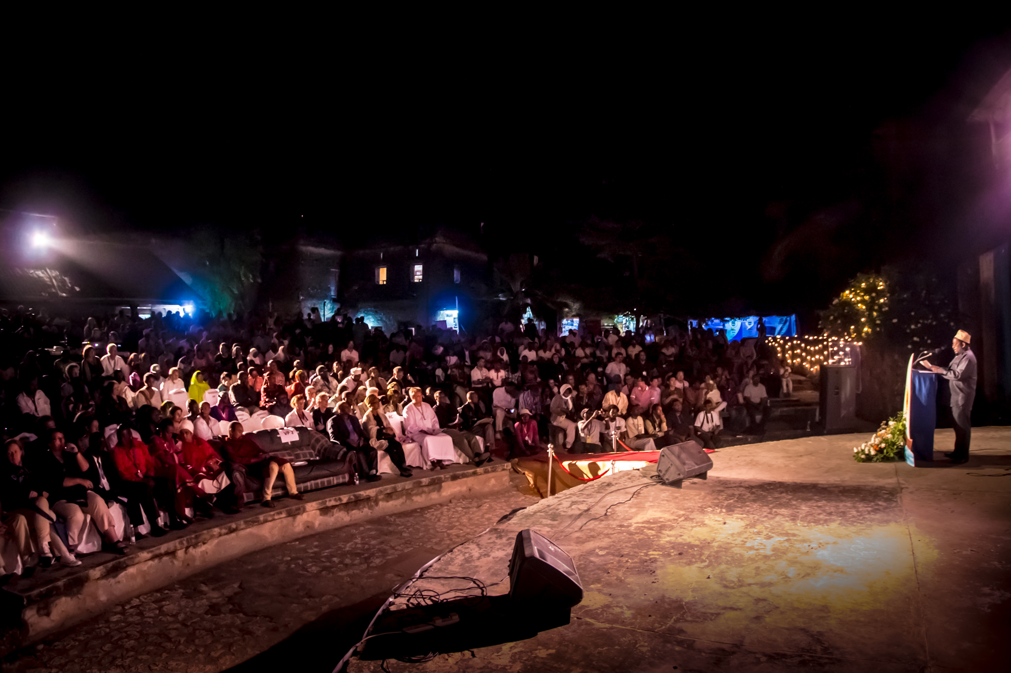 Copyright 2013, Peter Bennett